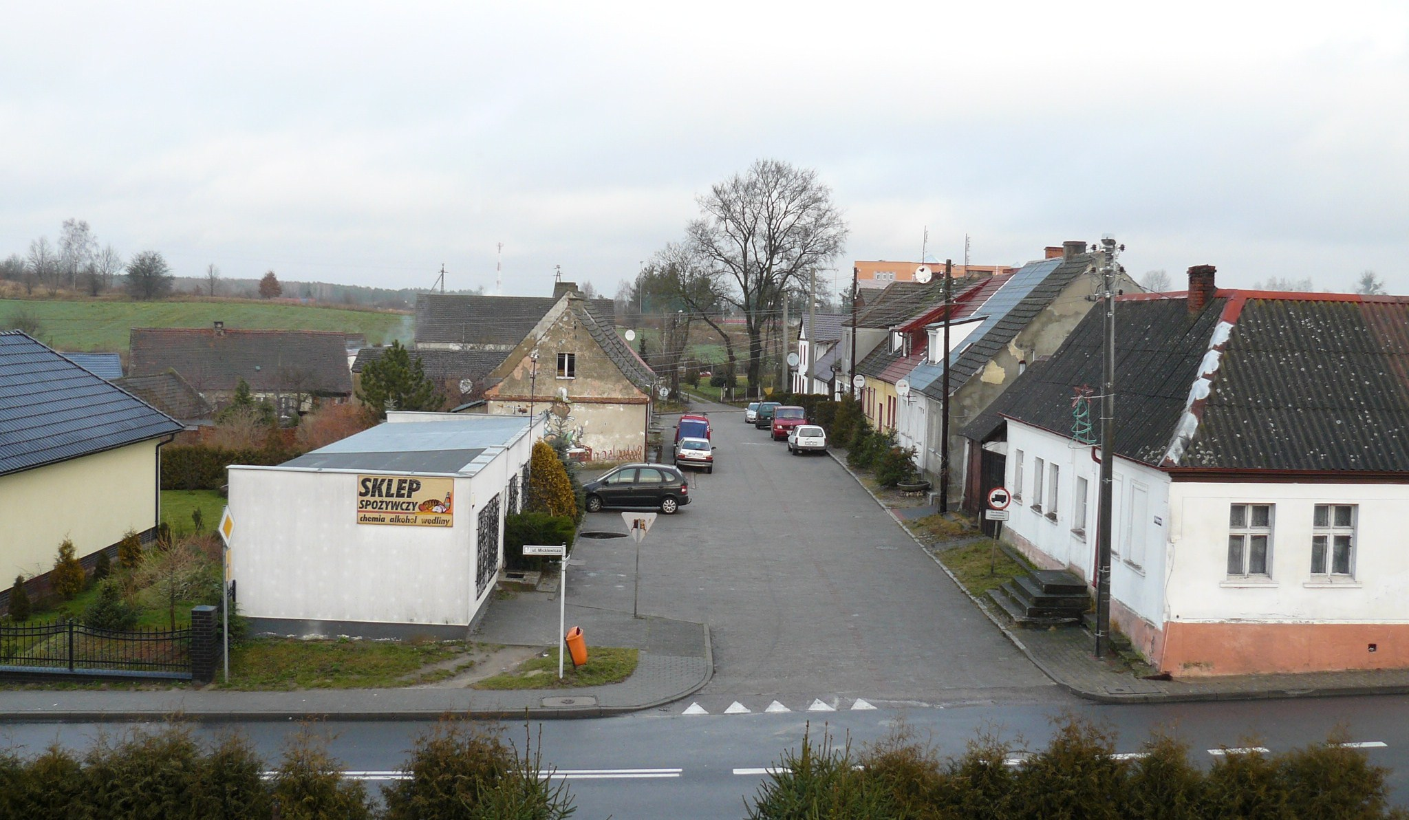 Tuczno, ul. Podgórna.